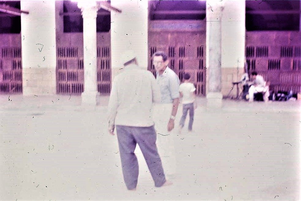 Chahine durante el rodaje de "Adieu Bonaparte", de 1985. Fotografía cedida por el autor.